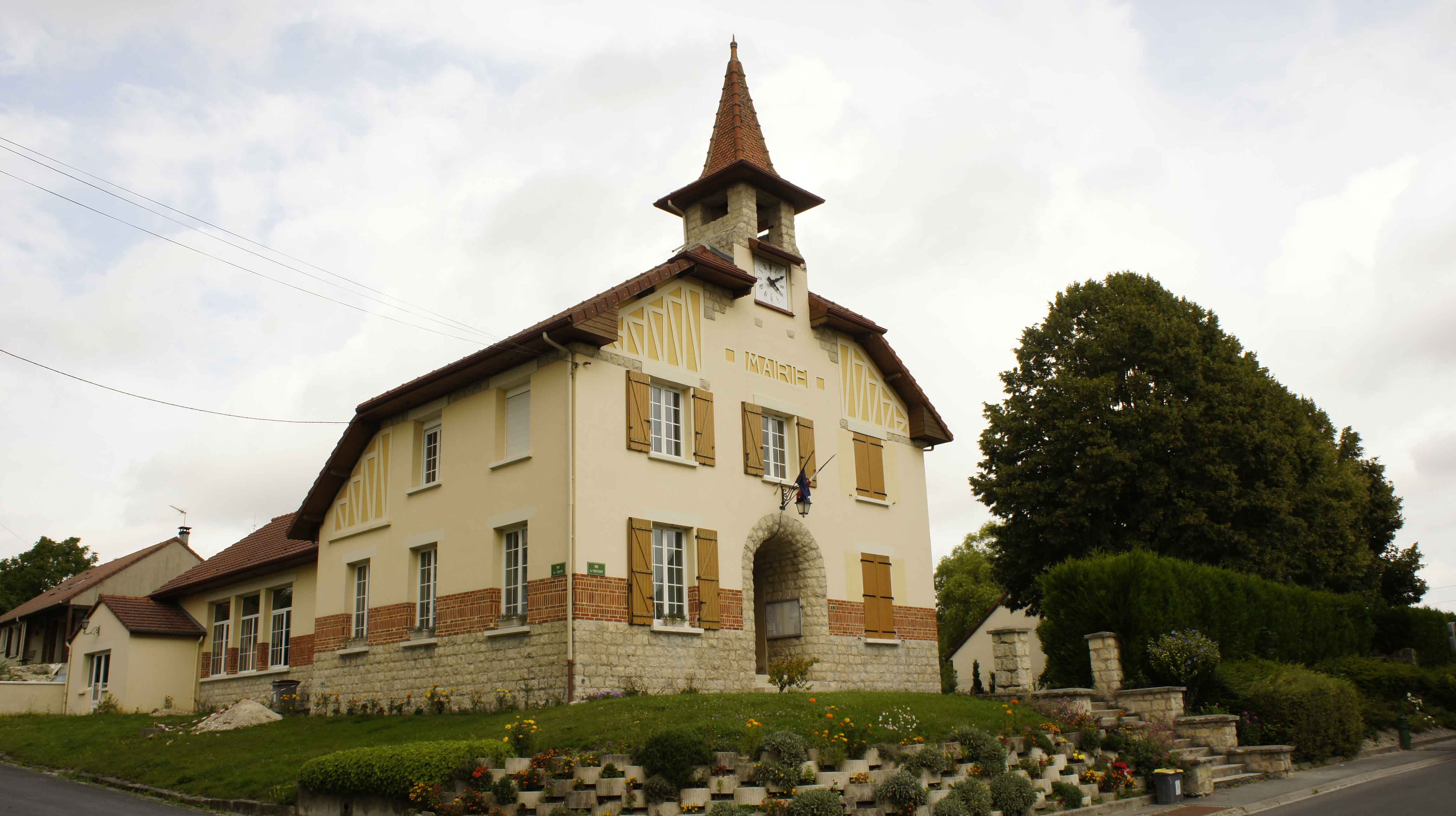 Vue de la Mairie de st-Souplet à Py.